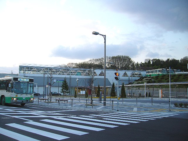 近鉄けいはんな線 学研北生駒駅 駅舎